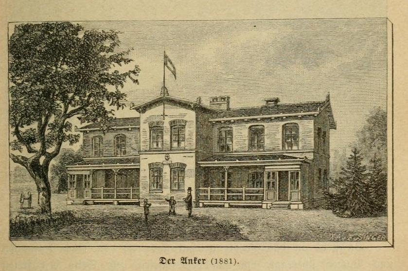 1881 errichtetes Gebäude für zwei Wohngruppen